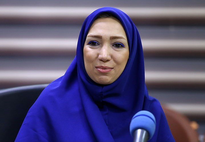 نسیم رفیعی - مراسم تجلیل از هنرمندان برنامه رادیویی صبح جمعه با شما ۱۷ تير ۱۳۹۷